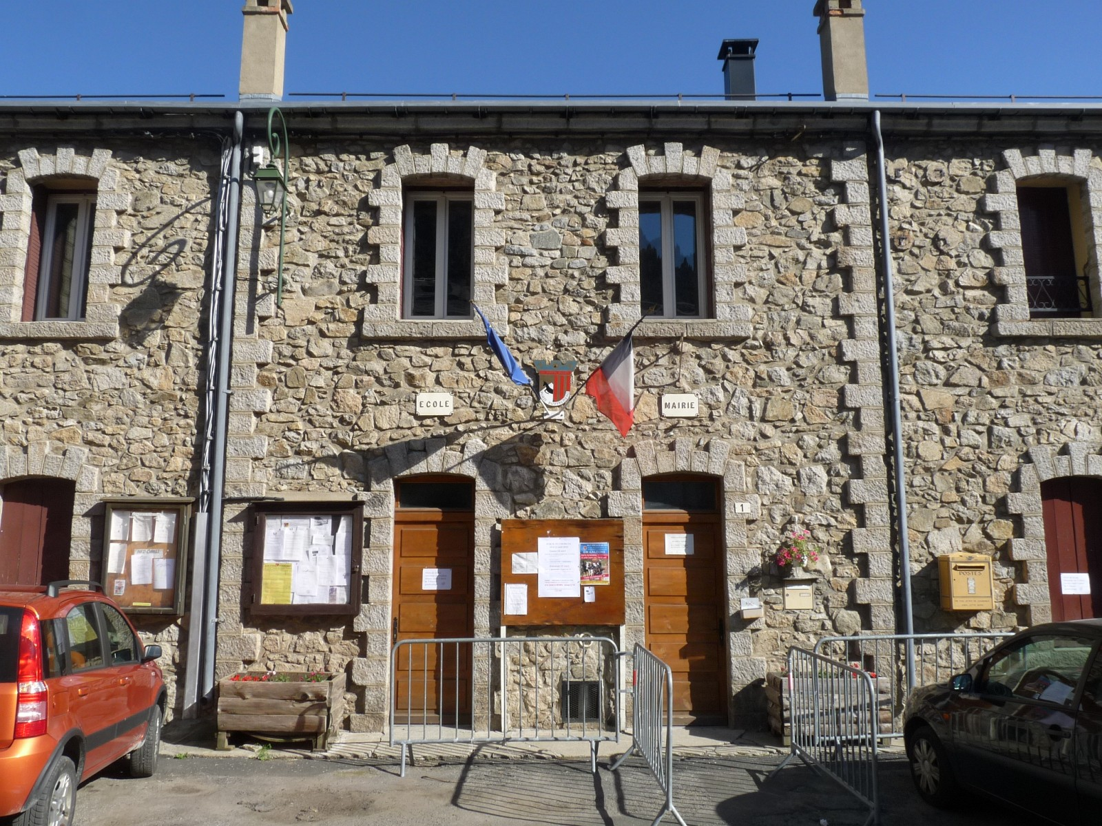 Mairie de Porté-Puymorens, Pyrénées-Orientales, France